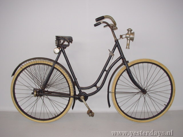 Bicycle Durkopp 1910